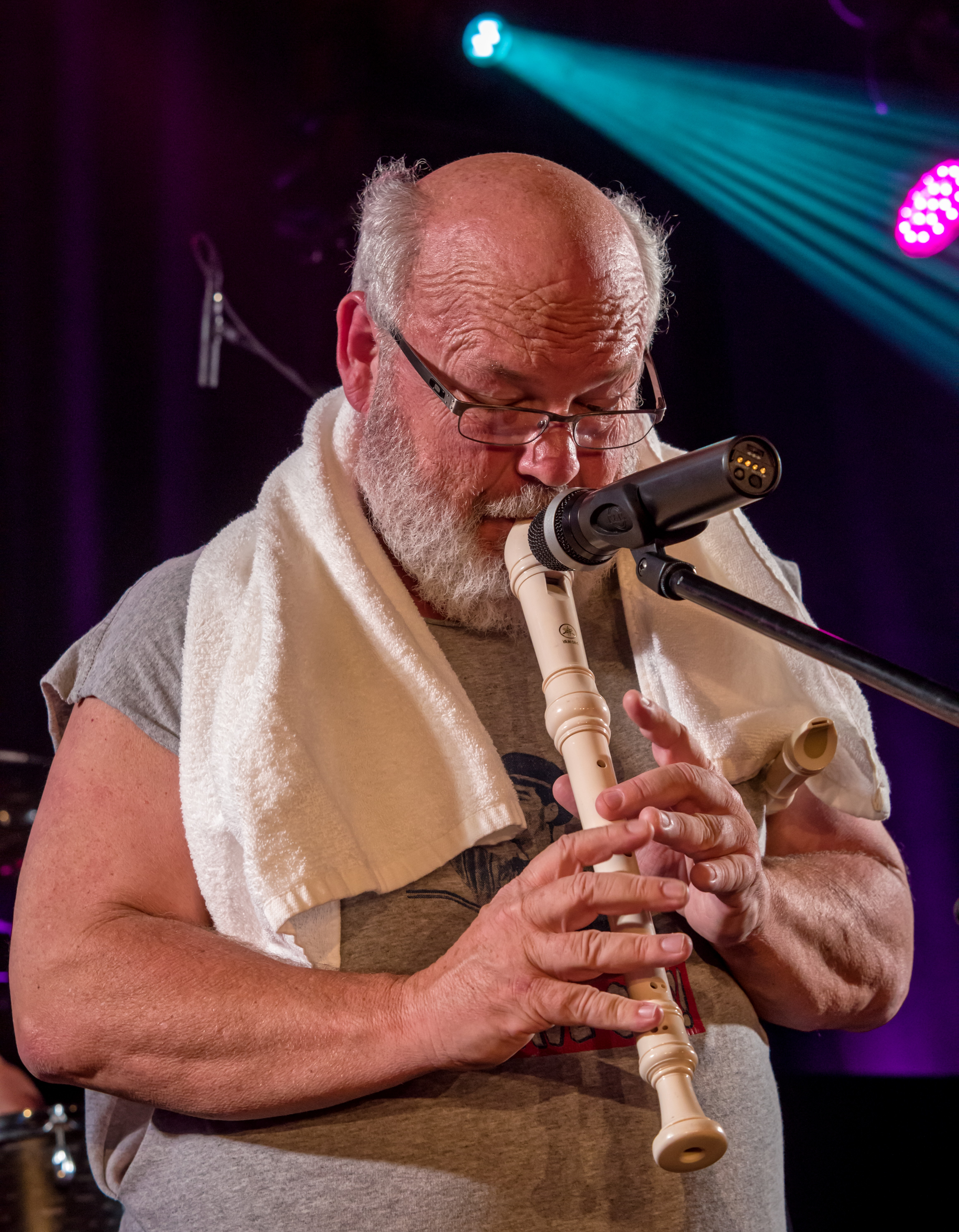 Bilder vom Zelt Musik Festival 2017 in Freiburg im Breisgau Kyle Gass Band